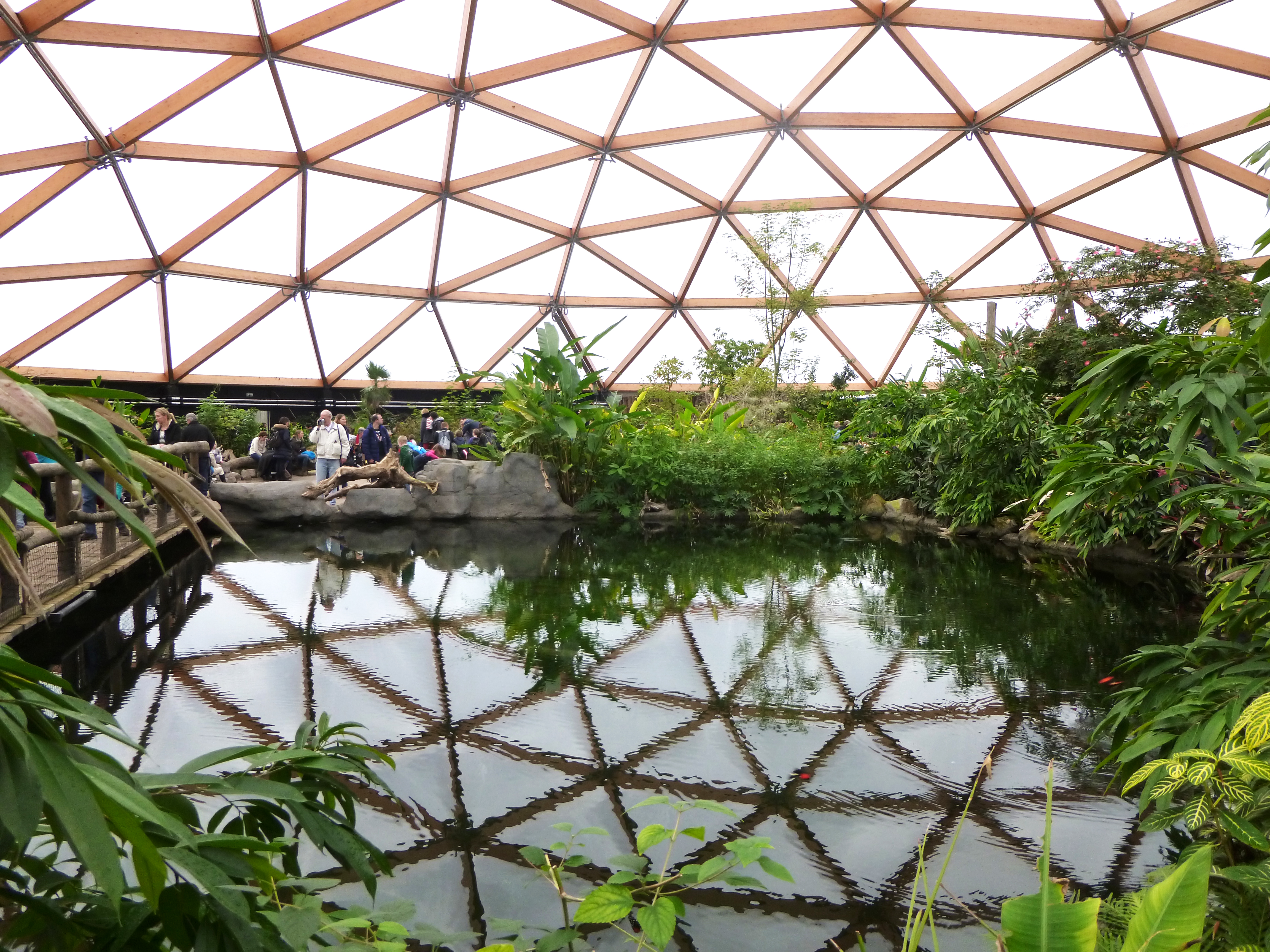 Interieur van de tropische vlindertuin Amazonica Dome in Blijdorp Rotterdam binnen een houten geodetische koepel.